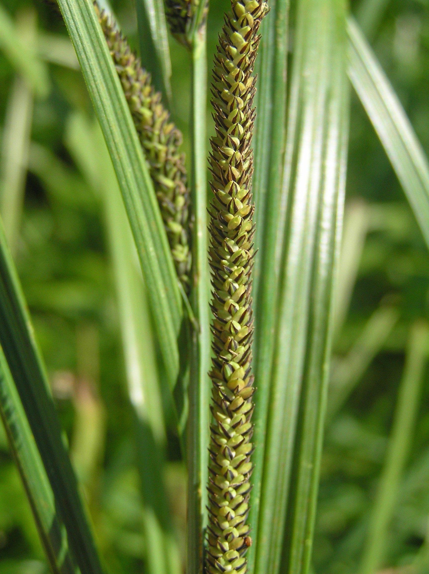 Carex acuta (C. gracilis), Jezernice, Czech Republik